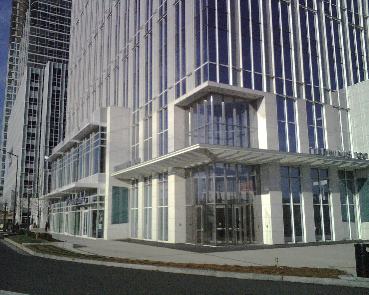 Terminus, Atlanta, Georgia